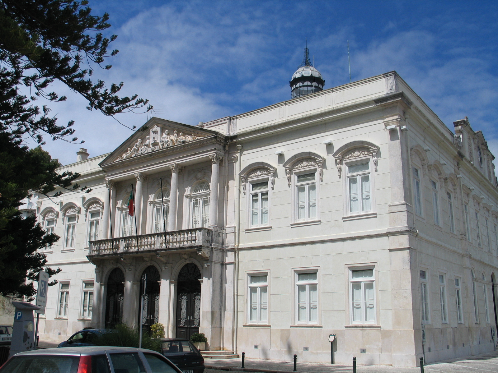 Alenquer (Portugal) - Paços do Concelho/ Town Hall